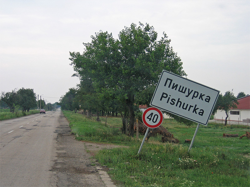 Село Пишурка